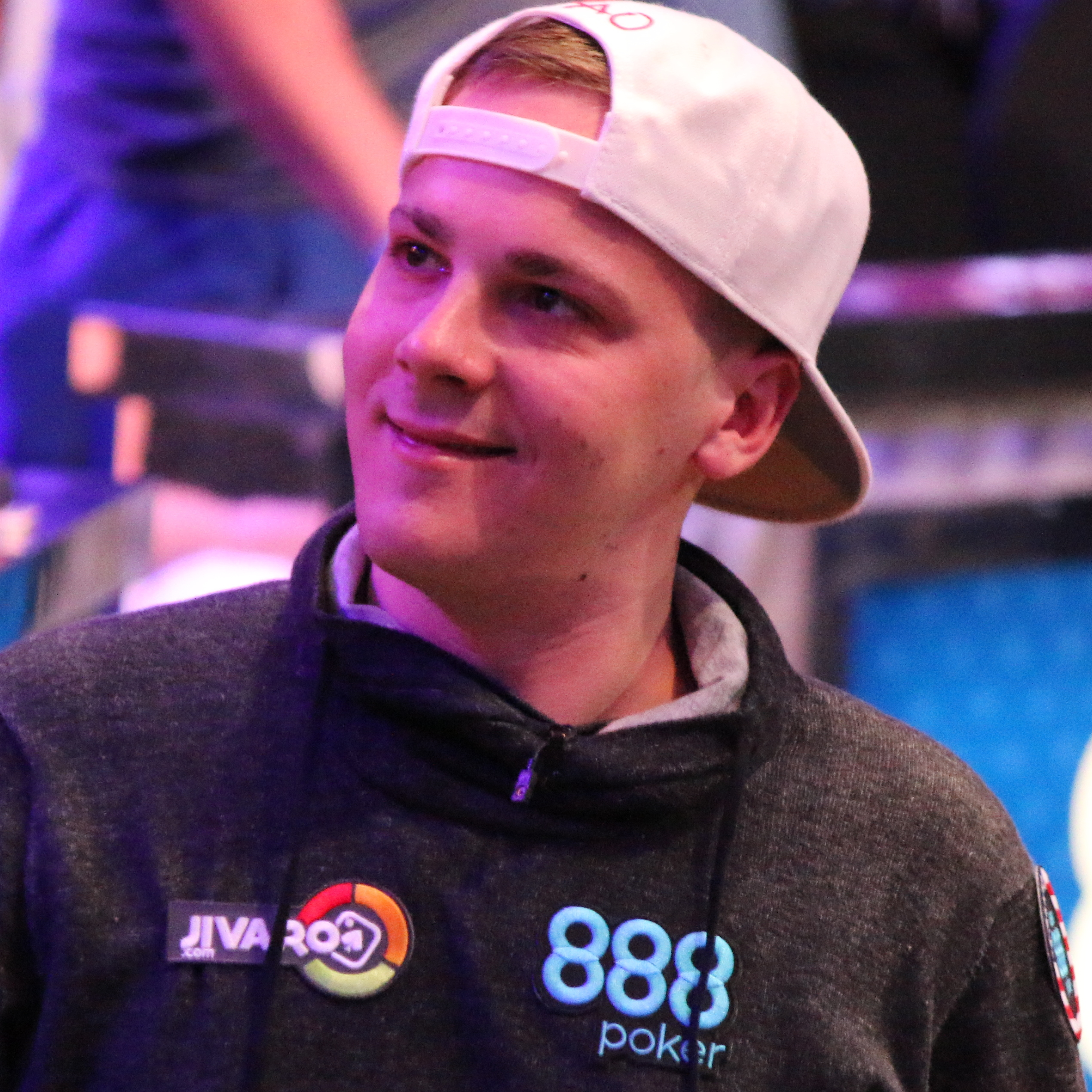 Tom Cannuli am Finaltisch des Main Events der World Series of Poker 2015